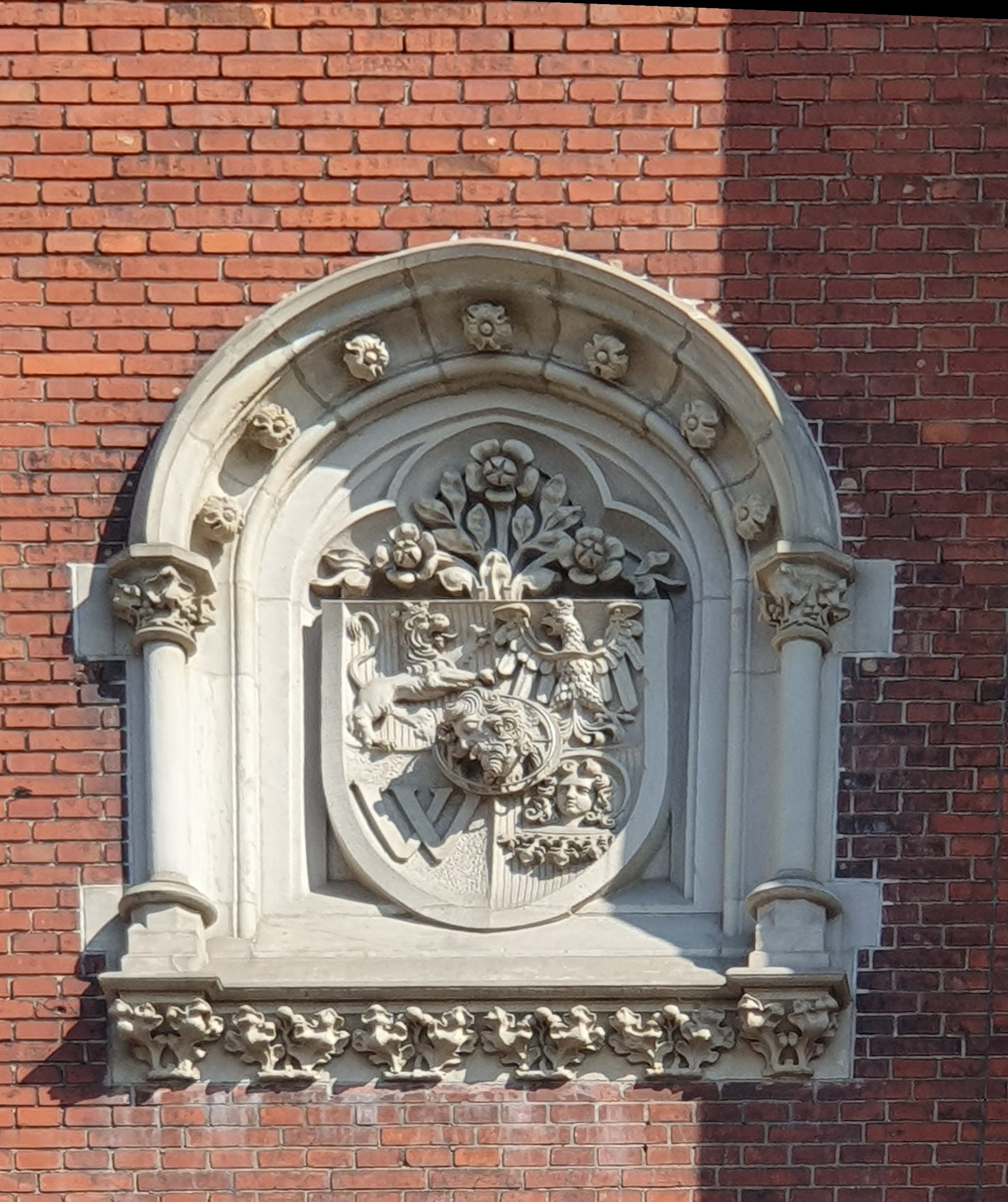 Herb Wrocławia na gmachu Biblioteki Uniwersytetu Wrocławskiego przy ul. Karola Szajnochy we Wrocławiui